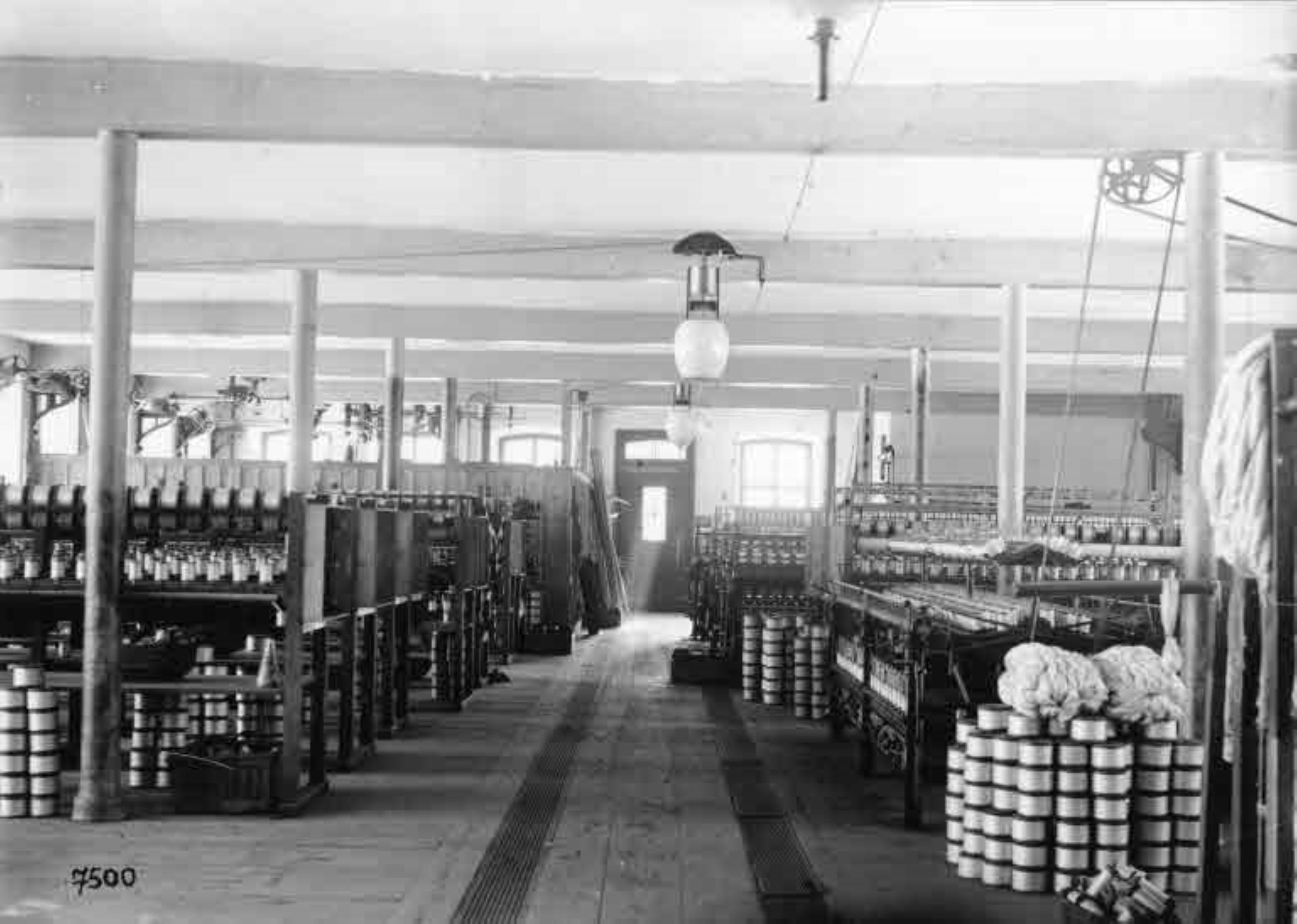 Seidenzwirnerei Zinggeler, Richterswil ZH, Schweiz, um 1890